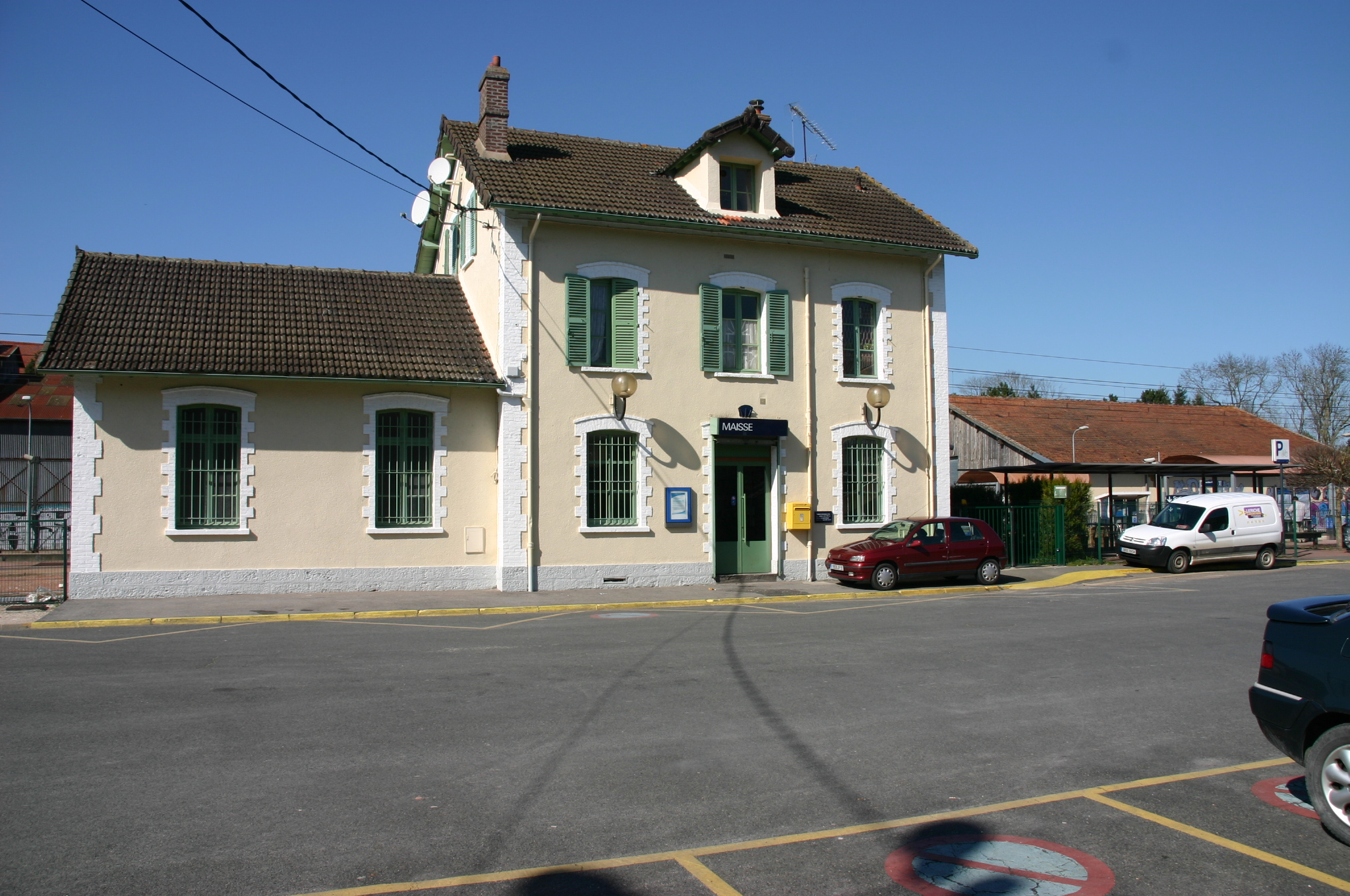 Gare de Maisse, Maisse, département de l'Essonne (France)